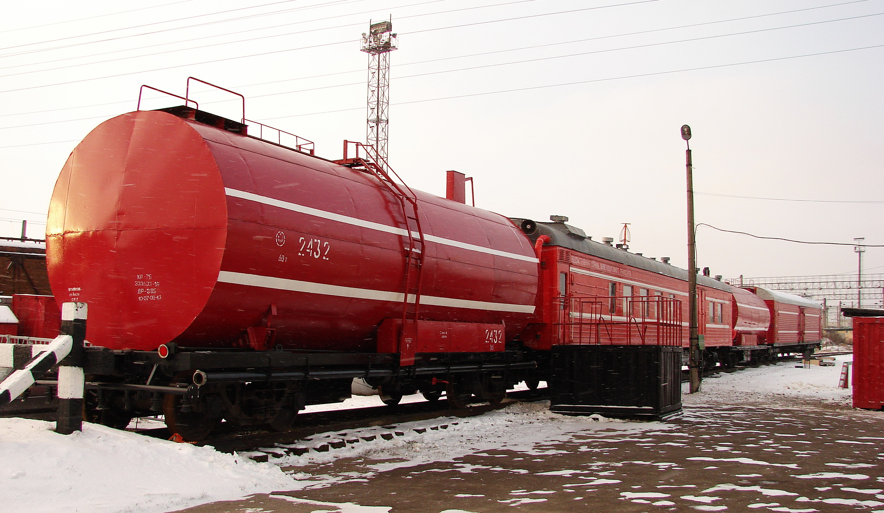 Пожарный поезд на сортировочной станции Лоста